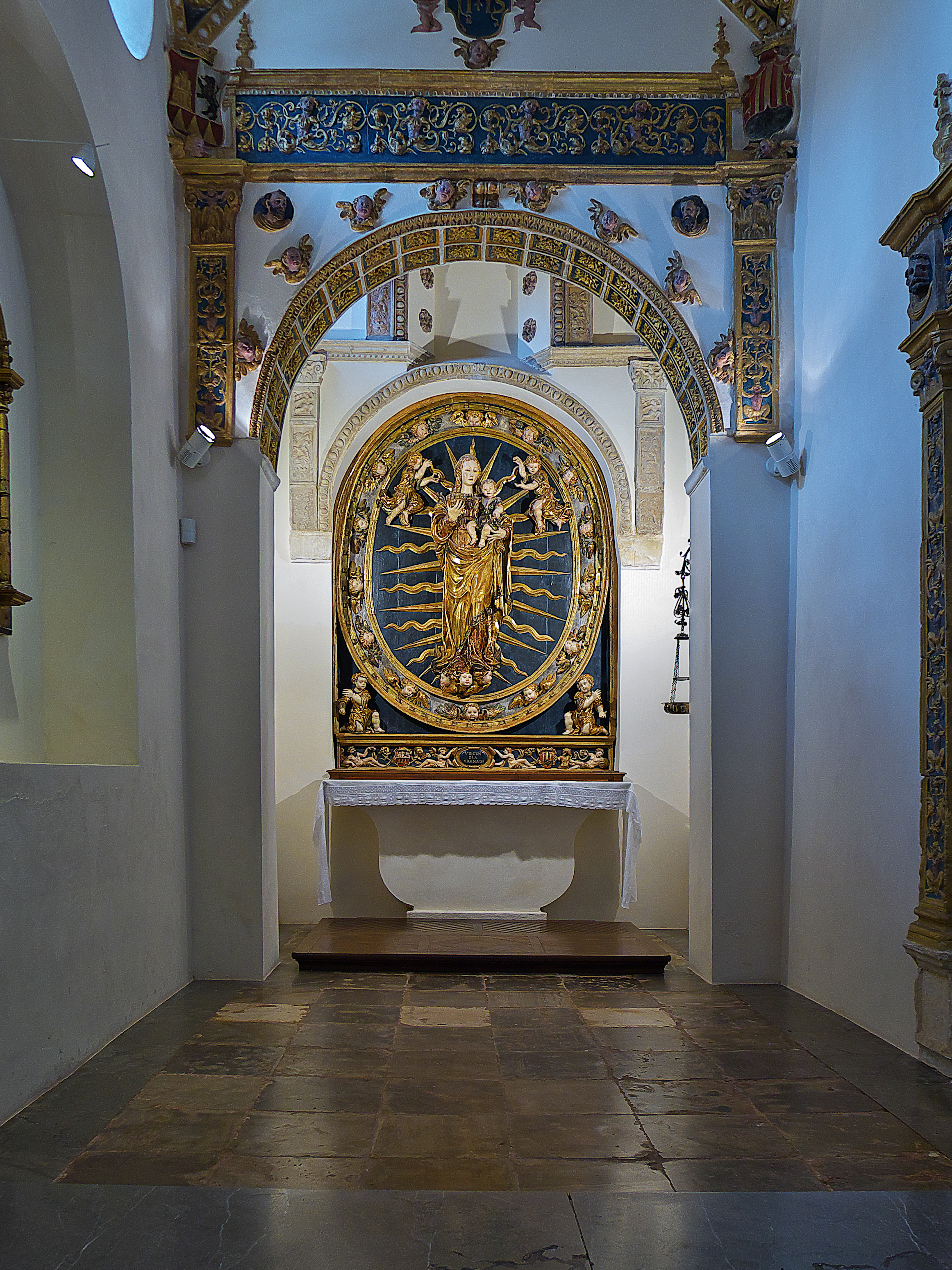 Logrado retablo-sagrario de la mitad del XVI (1544-1555). La escultura de la Virgen, que porta una granada, presenta un sagrario en su parte central. Atribuía a Diego Guillén Ferrant principalmente, y para otros a Roque Balduque